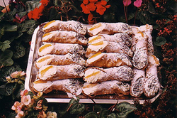 Cannoni siciliani